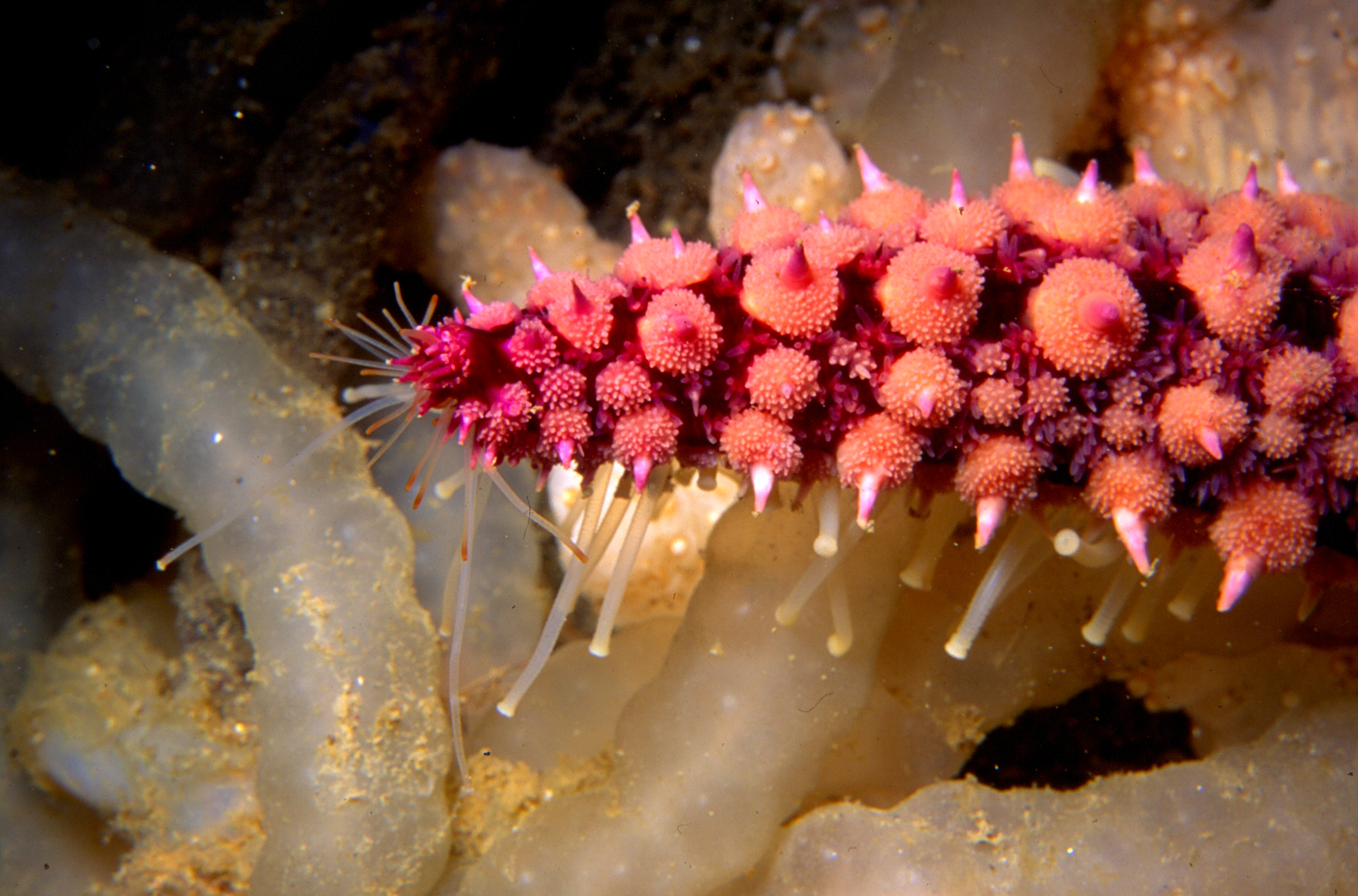 Marthasteria glacialis (Linnaeus, 1758) - Banyuls-sur-Mer : 07/91